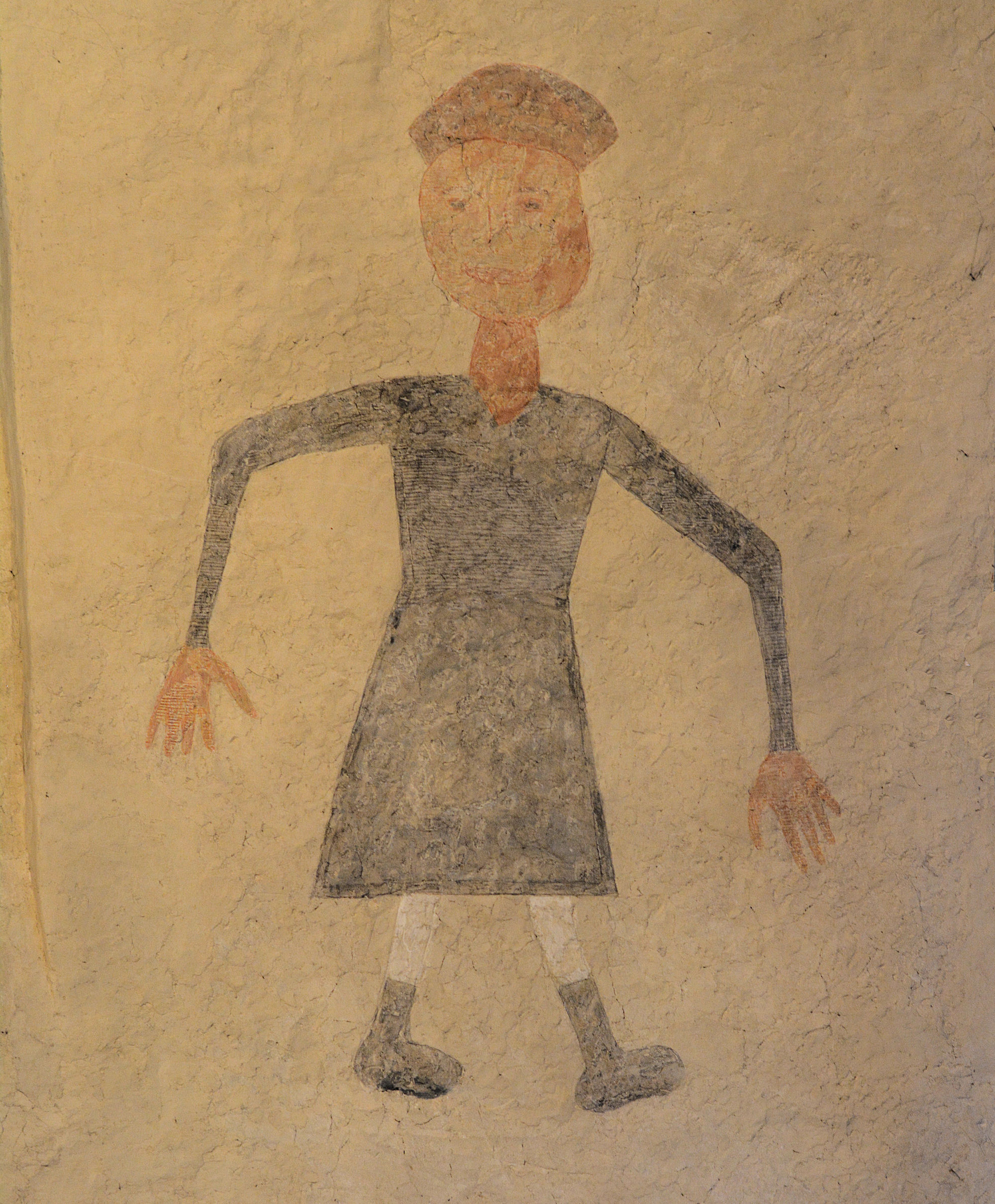 Kościół MB Częstochowskiej w Czachowie (gmina Cedynia).